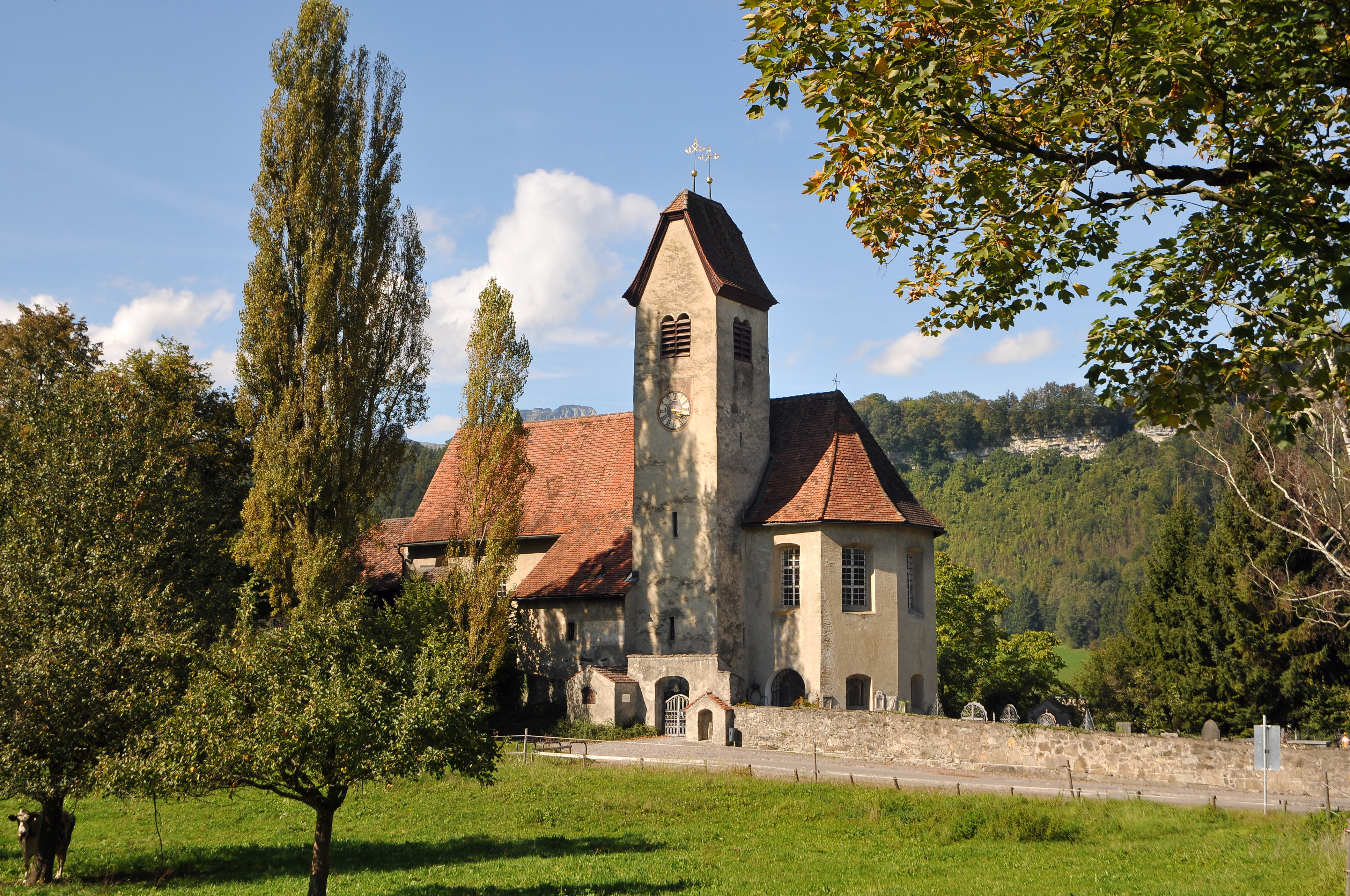 Alte Pfarrkirche hl. Michael und Friedhof in Tisis, Feldkirch.